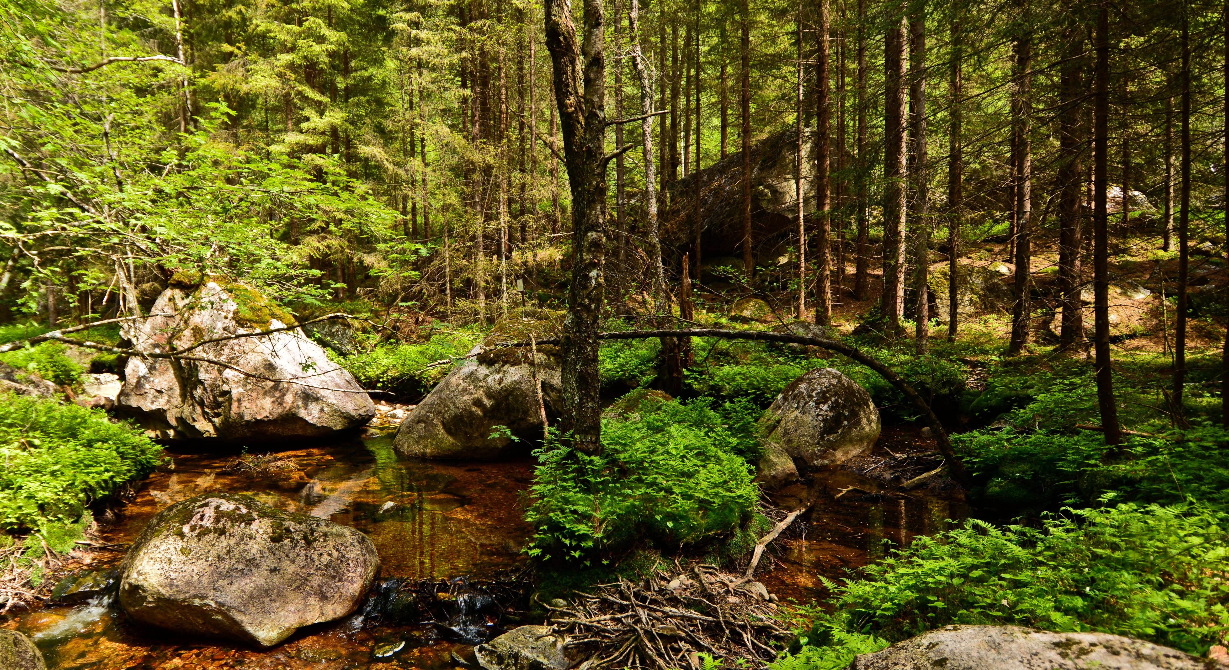 Parti av Linddalen naturreservat i Dåsvannsdalen i Hornnes i Evje og Hornnes kommune.